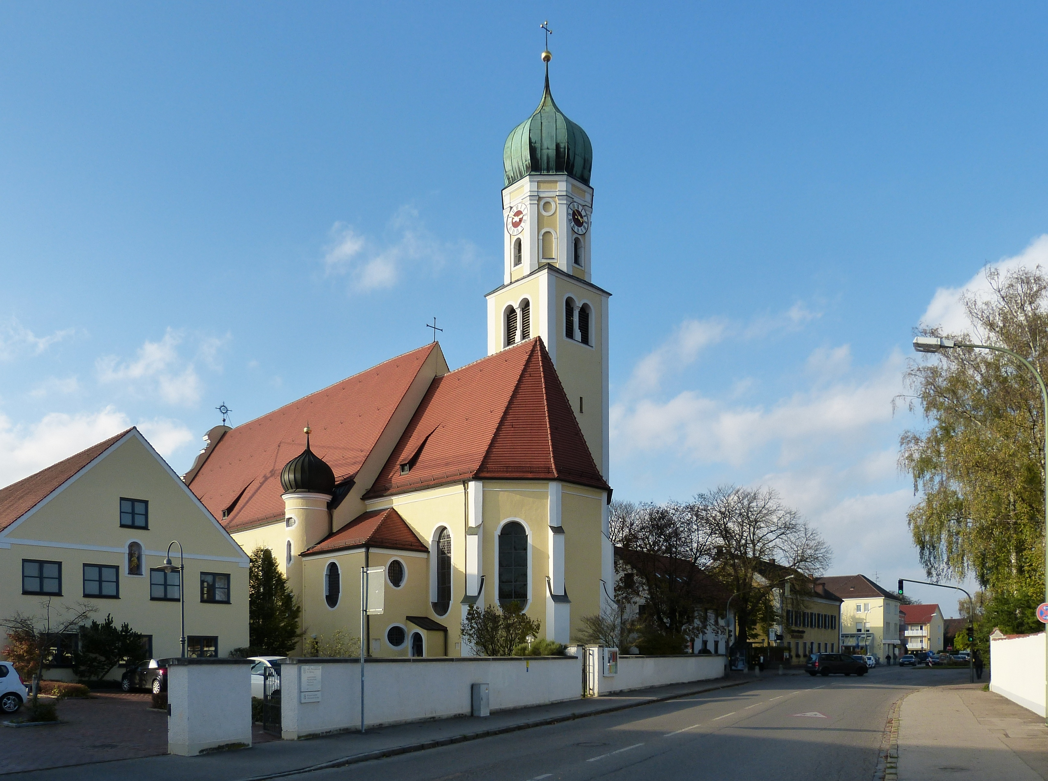 Augsburg, Bürgermeister-Widmeier-Straße 10, Kath. Pfarrkirche St. Georg This is a photograph of an architectural monument.